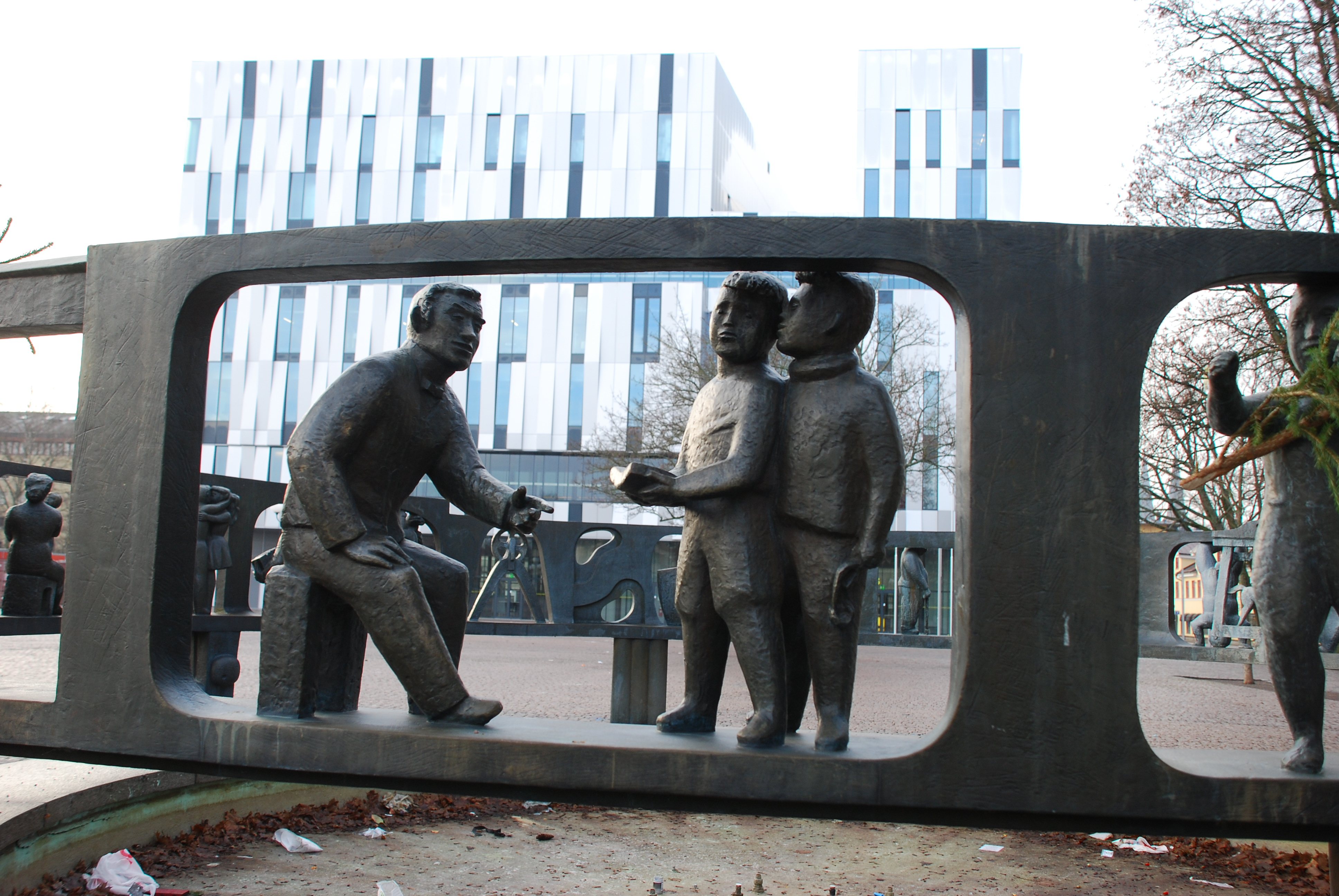 Axel Wallenberg's fountain on Vaksala Torg in Uppsala A bronze panel of the fountain says: Fontänen en gåva av Anders & Lisa Diös till Uppsala stad; Anders Wallenberg skulptör - gjuten hos Hn. Bergman